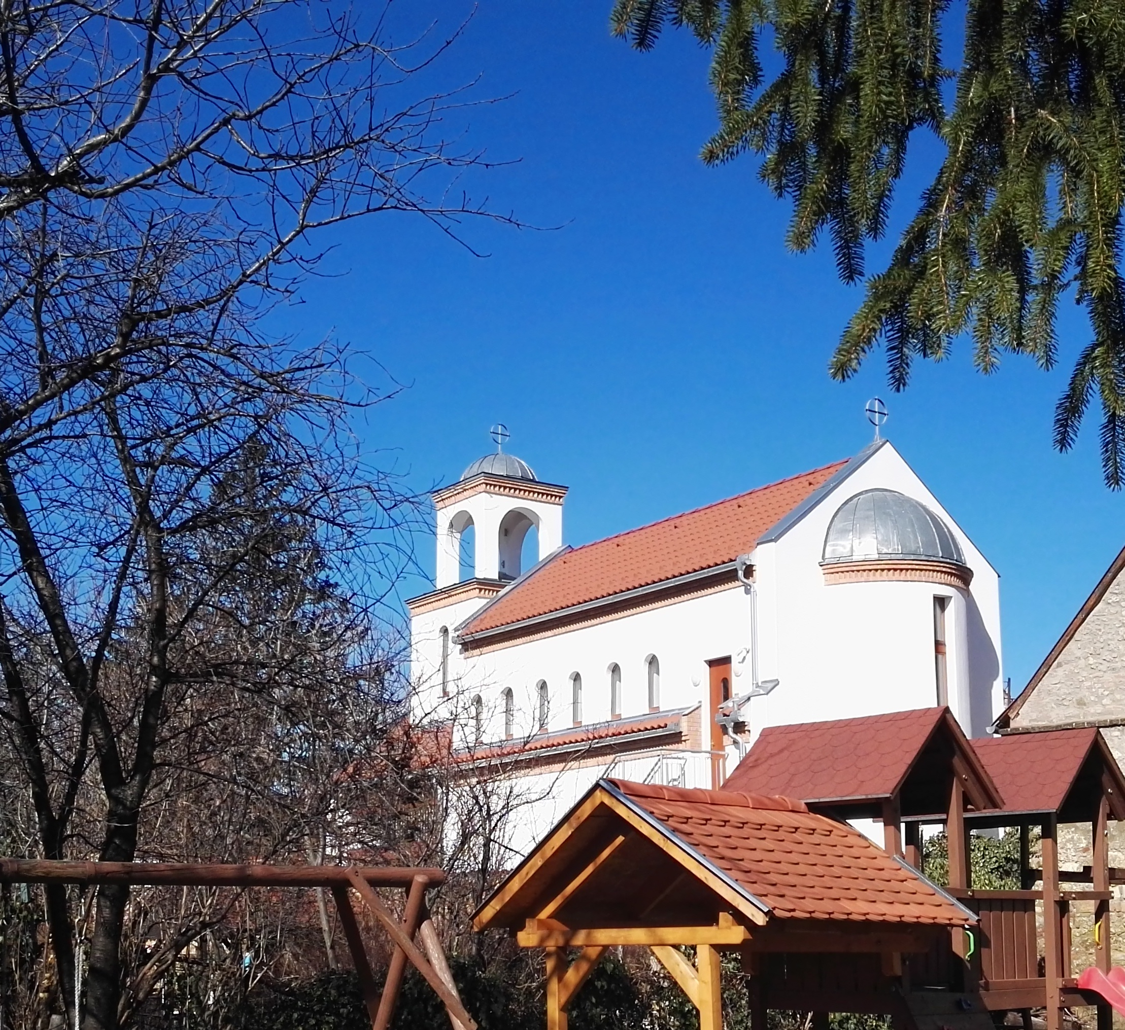 A pécsi Szent Andronikosz és Júnia ortodox templom, cím: 7621 Pécs, Zrínyi utca 15.